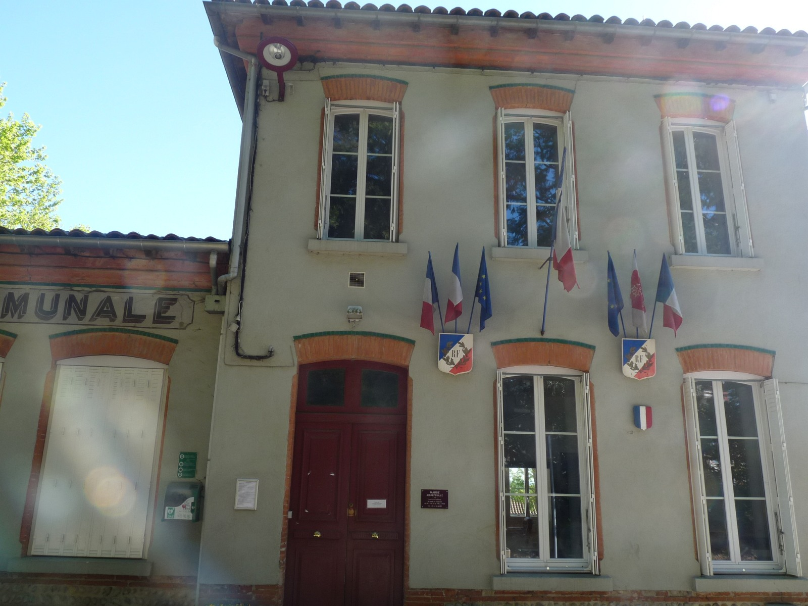 Mairie d'Aigrefeuille, Haute-Garonne, France